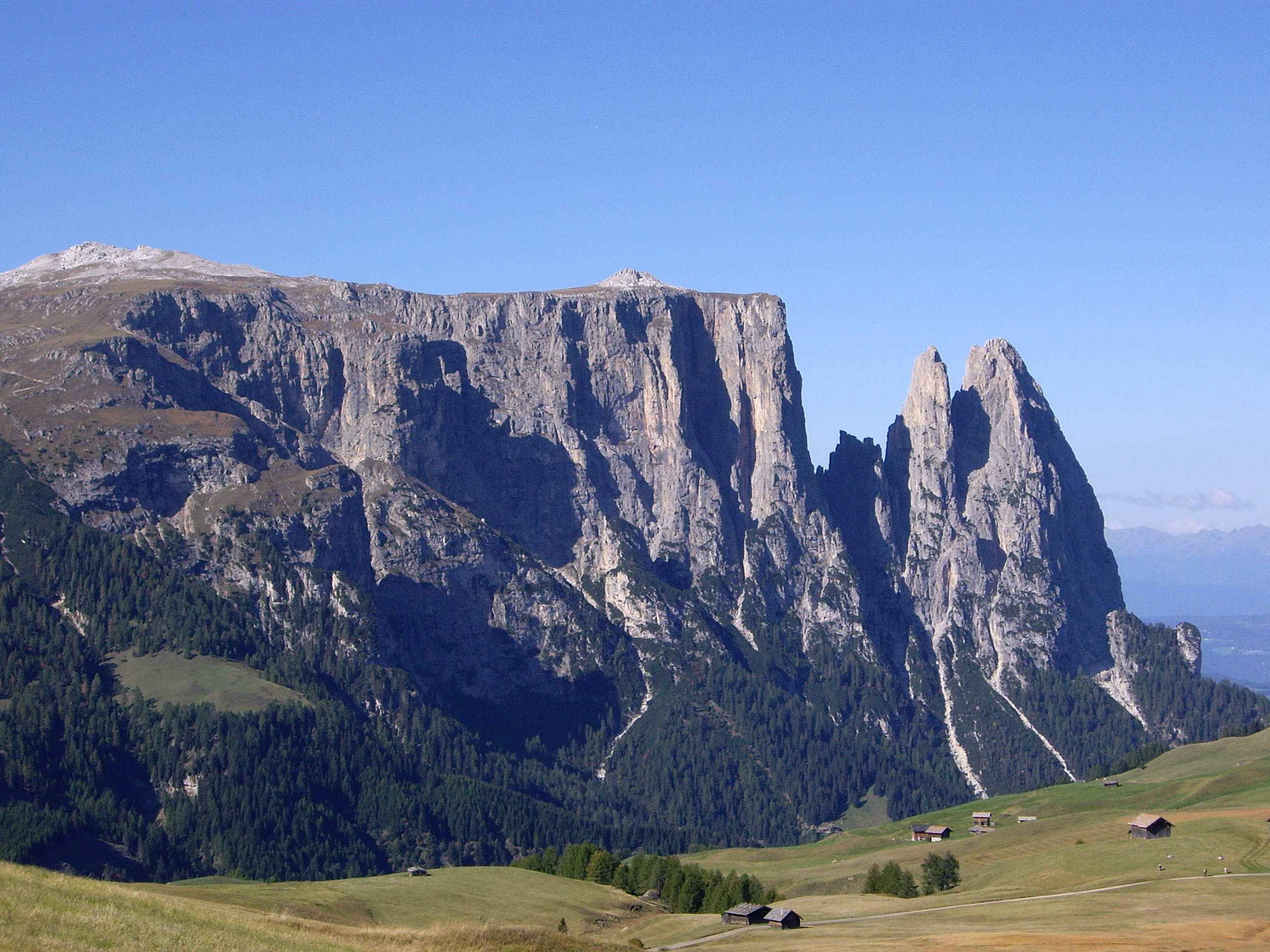 Der Schlern (links), die Santner- und Euringerspitze (rechts) aus Sicht der Seiser Alm